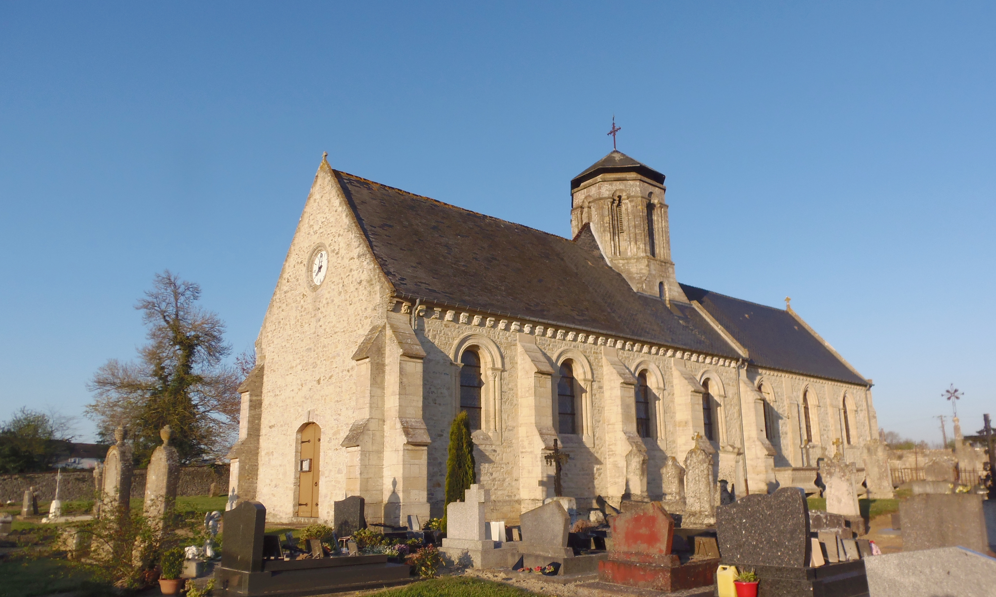 Cottun (Normandie, France). L'église Saint-André.